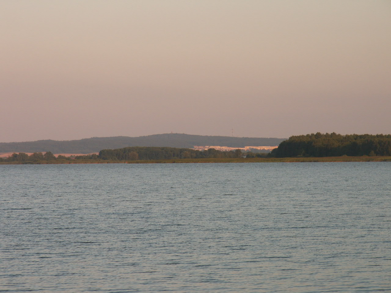 jezioro Jamno - Koszalin